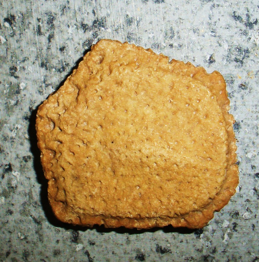 Fossil of Holmesina, an extinct mammal